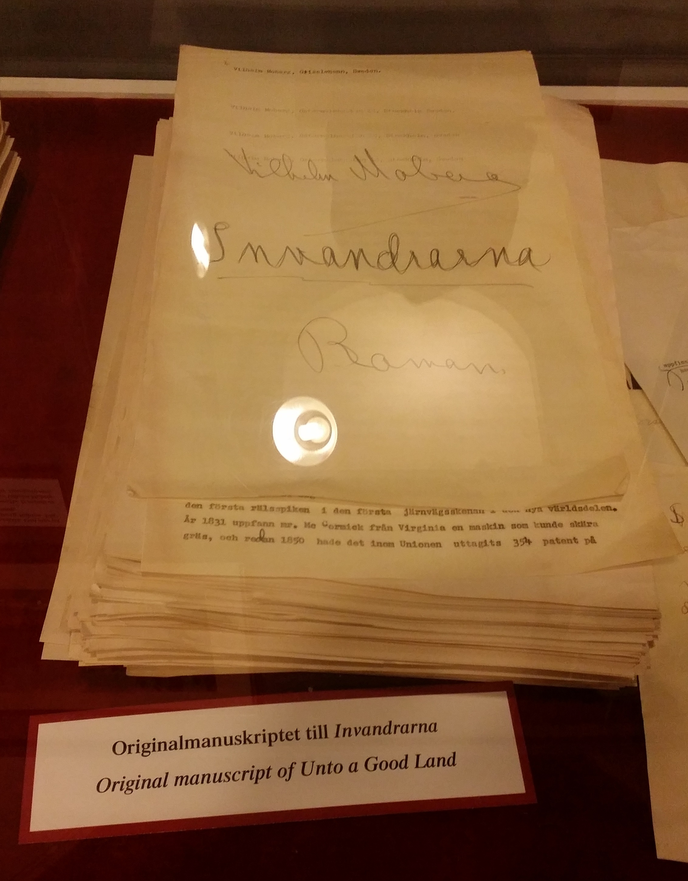 Originalmanuskriptet till "Invandrarna" (1952).